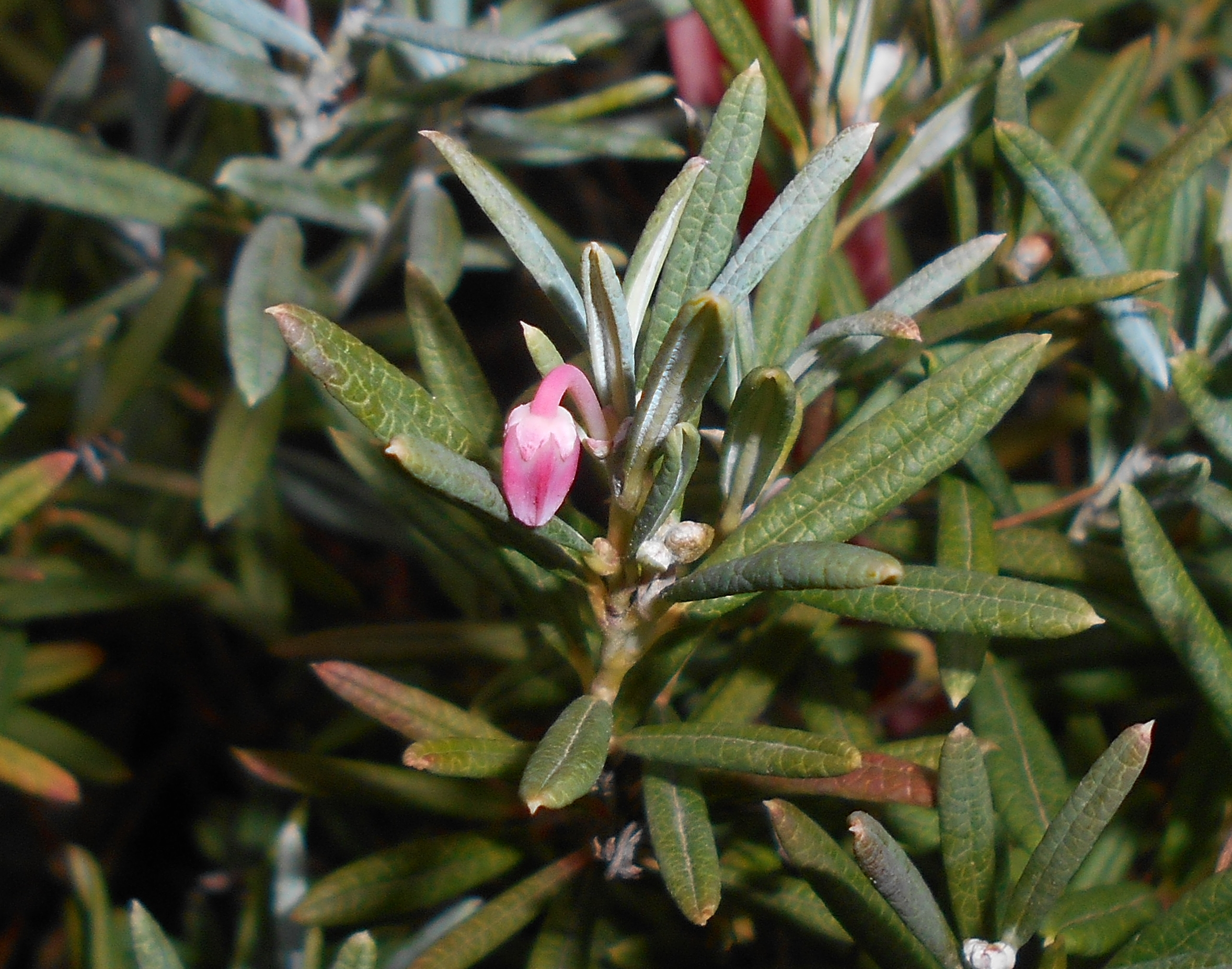 Modrzewnica zwyczajna (Andromeda polifolia), Ogród Botaniczny UMCS w Lublinie.